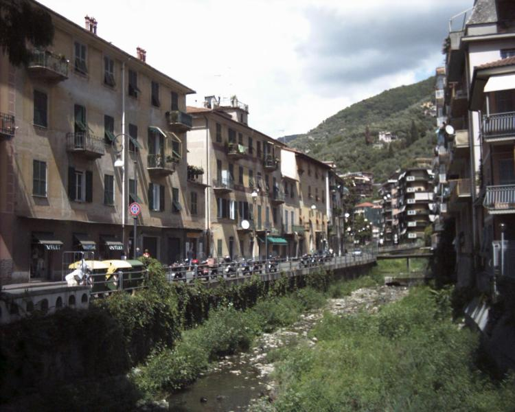 Via Betti, quartiere di Rapallo